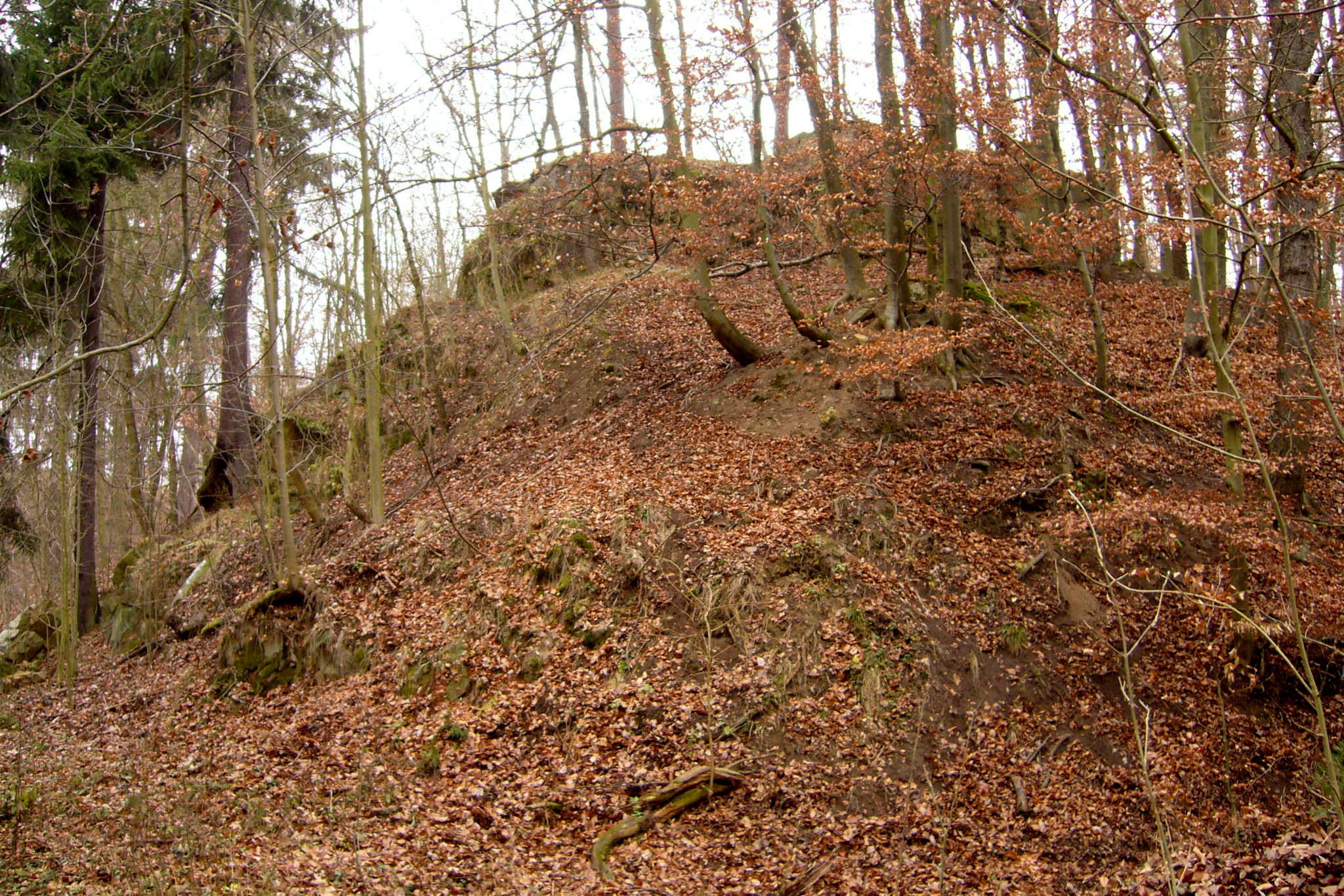 Šprymberk - hradní jádro